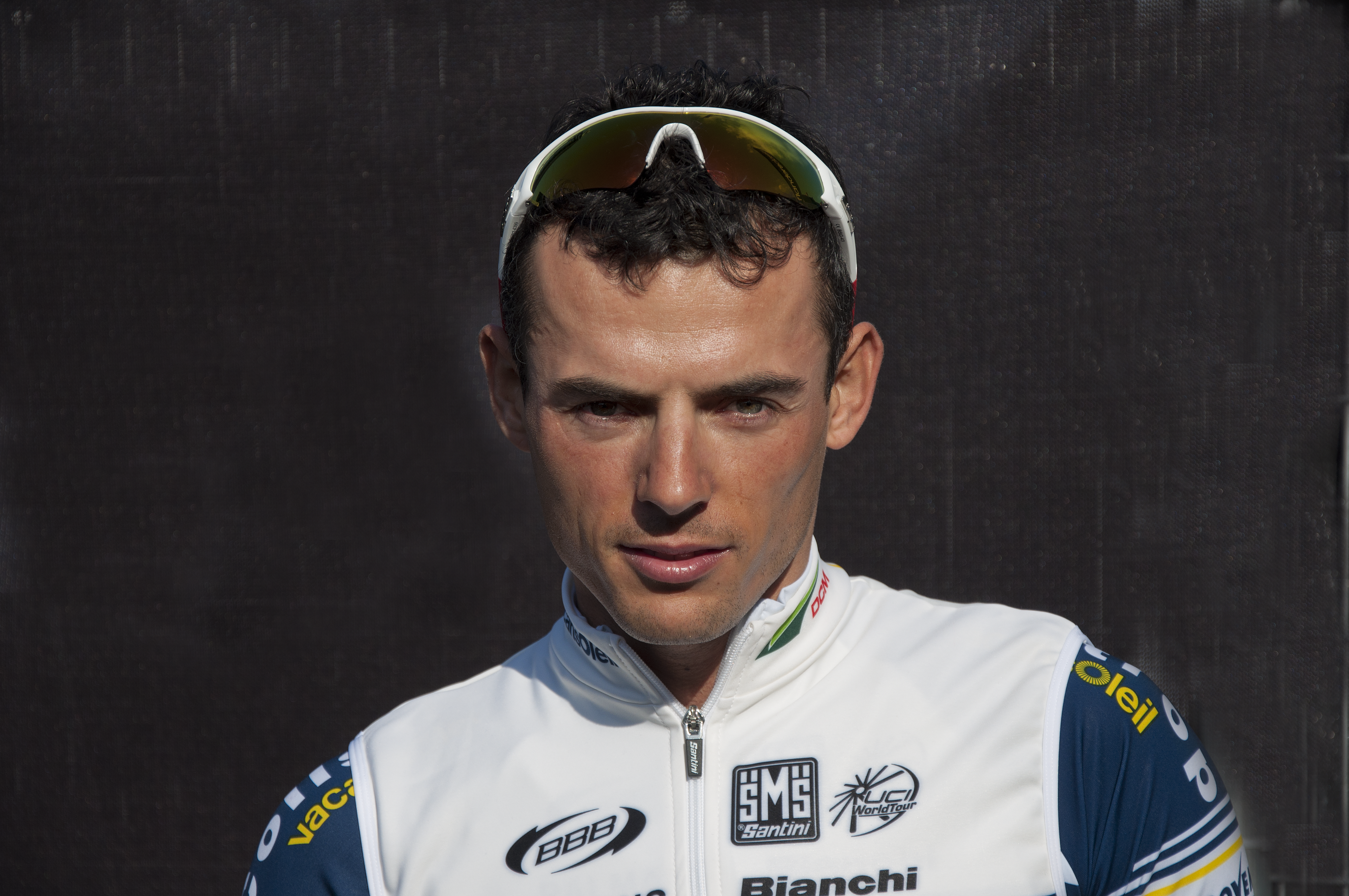 Björn Leukemans bij de start van de Omloop Het Nieuwsblad 2012 te Gent